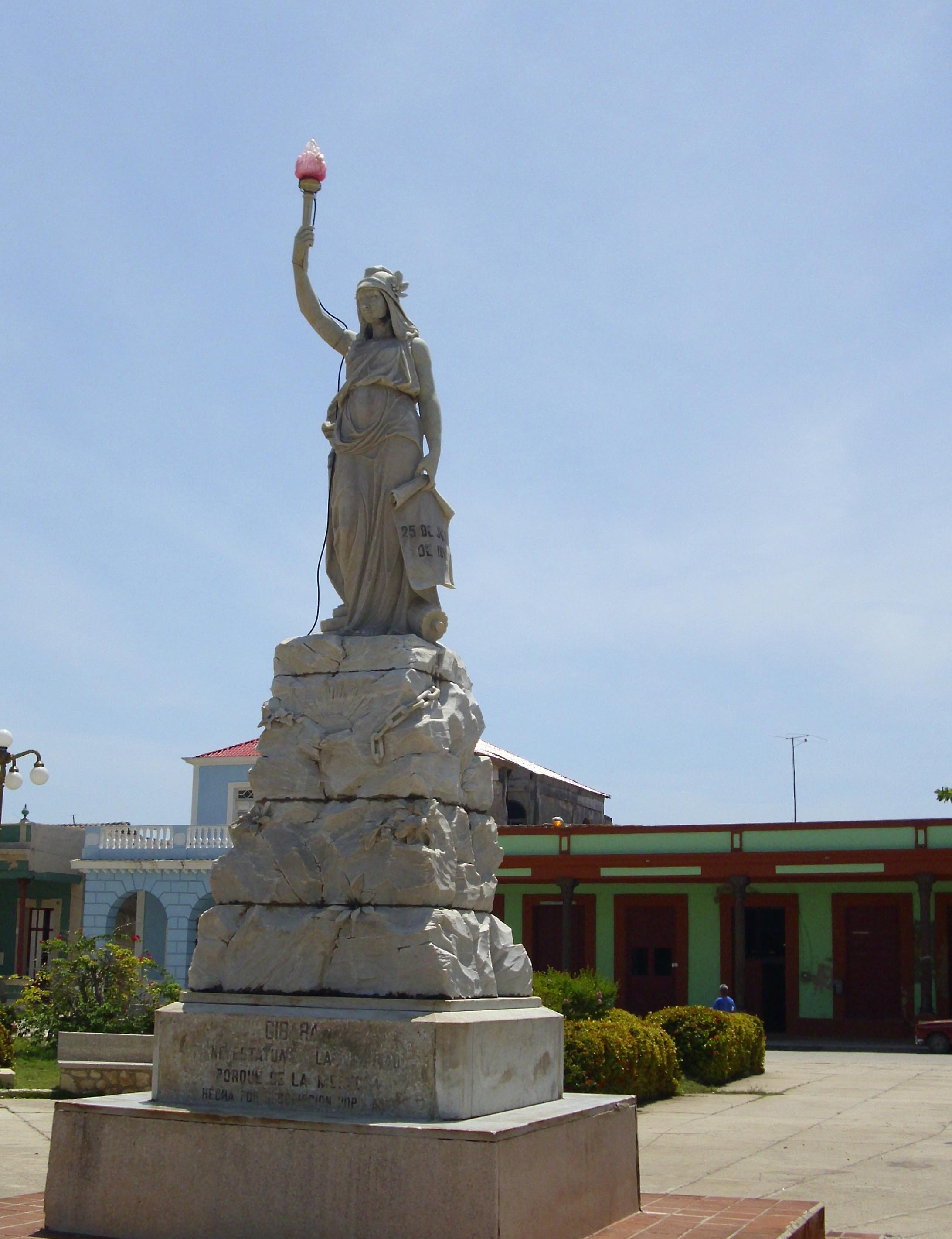 Réplica de La Estatua de la Libertad. Hecha de Mármol de Carrara.